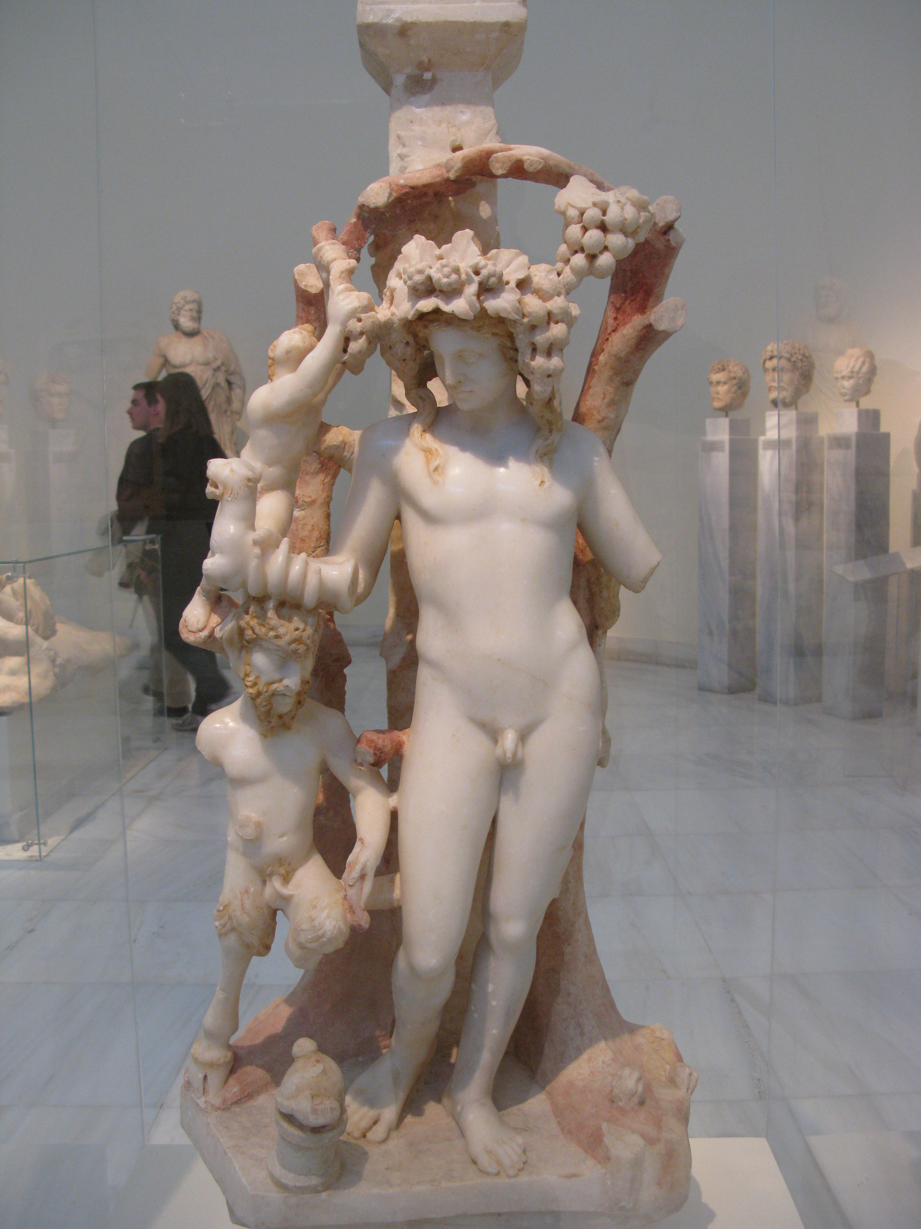 5706. Table support with a Dionysiac group. Marble from Dokimeion in Asia Minor. Unknown provenance. This piece was the single support for a table top. The pillar-support is adorned by a group of Dionysos, Pan and a Satyr. The nude Dionysos holds a rhyton (ritual vase) ending in the front half of a panther. Next to him the goat-footed god Pan holds a lagobolon (stick to hares). In front of him is a small cylindrical basket, from which a snake is emerging. A young Satyr climbs up the vine and cuts grapes with in his right hand. From the branch hangs a lagobolon, a pan-pipe and a goatskin. The exposed parts of the bodies are very well polished. Traces of red and yellow colour are preserved on the hair of the figures and the branches. This elaborate piece is from an Asia Minor workshop. AD 170-180. National Archaeological Museum, Athens, Greece --- 5706. Τραπεζοφόρο με διονυσιακό σύμπλεγμα. Μάρμαρο Δοκιμείου Μικράς Ασίας. Άγνωστης προέλευσης. Αποτελούσε το μονόποδο στήριγμα της πλάκας ενός τραπεζιού. Τον πεσσό-στήριγμα στολίζει σύμπλεγμα Διονύσου, Πανός και Σατύρου. Ο γυμνός Διόνυσος κρατεί ρυτόν (τελετουργικό αγγείο) που απολήγει σε ημίτομο πάνθηρα. Πλάι τou ο τραγοπόδαρος Παν κρατεί λαγωβόλο. Μπροστά του υπάρχει μια μικρή κυλινδρική κίαιην από όπου ξεπροβάλλει φίδι. Ο μίκρος Σάτυρος είναι οκαρφαλωμένος στην κληματαριά και, κρατώντας στο δεξί χέρι ένα δρεπάνι, κόβει σταφύλια. Από το κλαδί ένα λαγωβόλο, η σύριγγα του Πανός και μια δορά αίγας, Τα γυμνά μέρη των σωμάτων είναι πολύ καλά στιλβωμένα. Ίχνη κόκκινου και κίτρινου χρώματος οώζονται στα μαλλιά και στα κλαδιά. Το περίτεχνο έργο προέρχεται από μικρασιατικό εργαστήριο. 170-180 μ.Χ. Εθνικό Αρχαιολογική Μουσείο. Αθήνα.